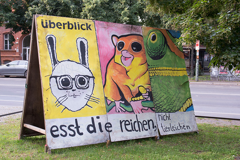 Poster "Esst die Reichen" der Bergpartei